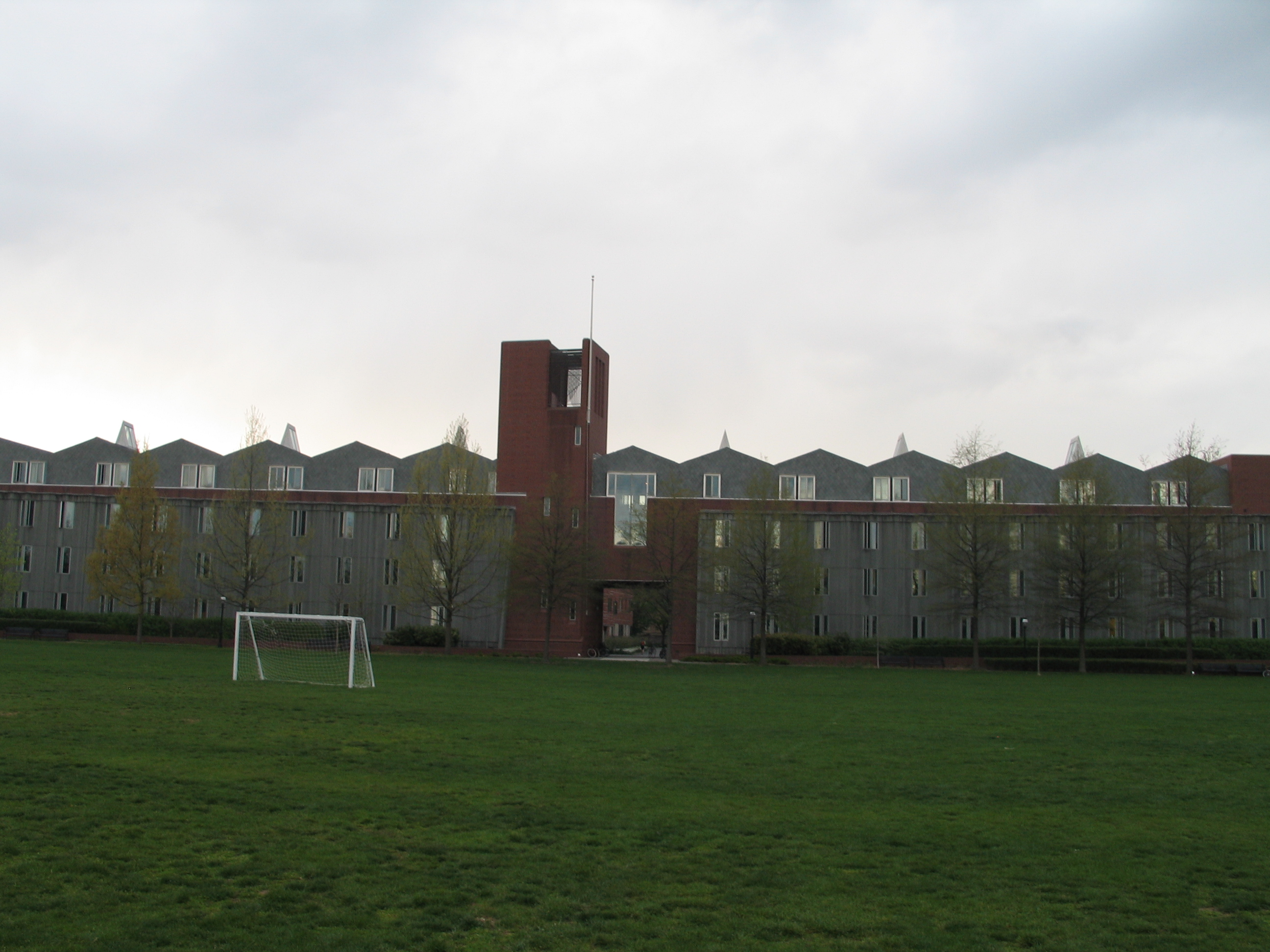 Scully Building, Princeton University (view from Pardee Field)